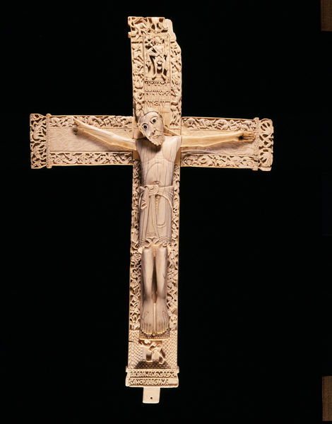 Crucifijo de don Fernando y doña Sancha (Románico). Número de inventario: 52340.